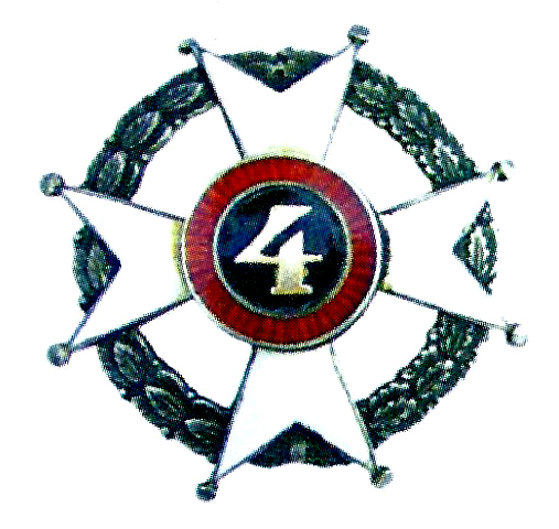 Odznaka pamiątkowa 4 psap